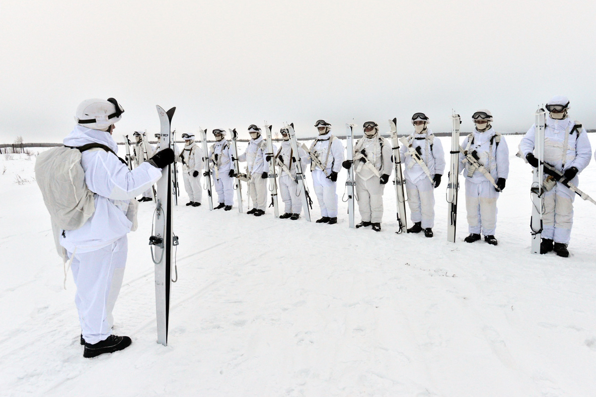 Занятия по управлению оленьими и собачьими упряжками с военнослужащими 80-й отдельной арктической мотострелковой бригады Северного флота (поселок Ловозеро, Мурманская область).